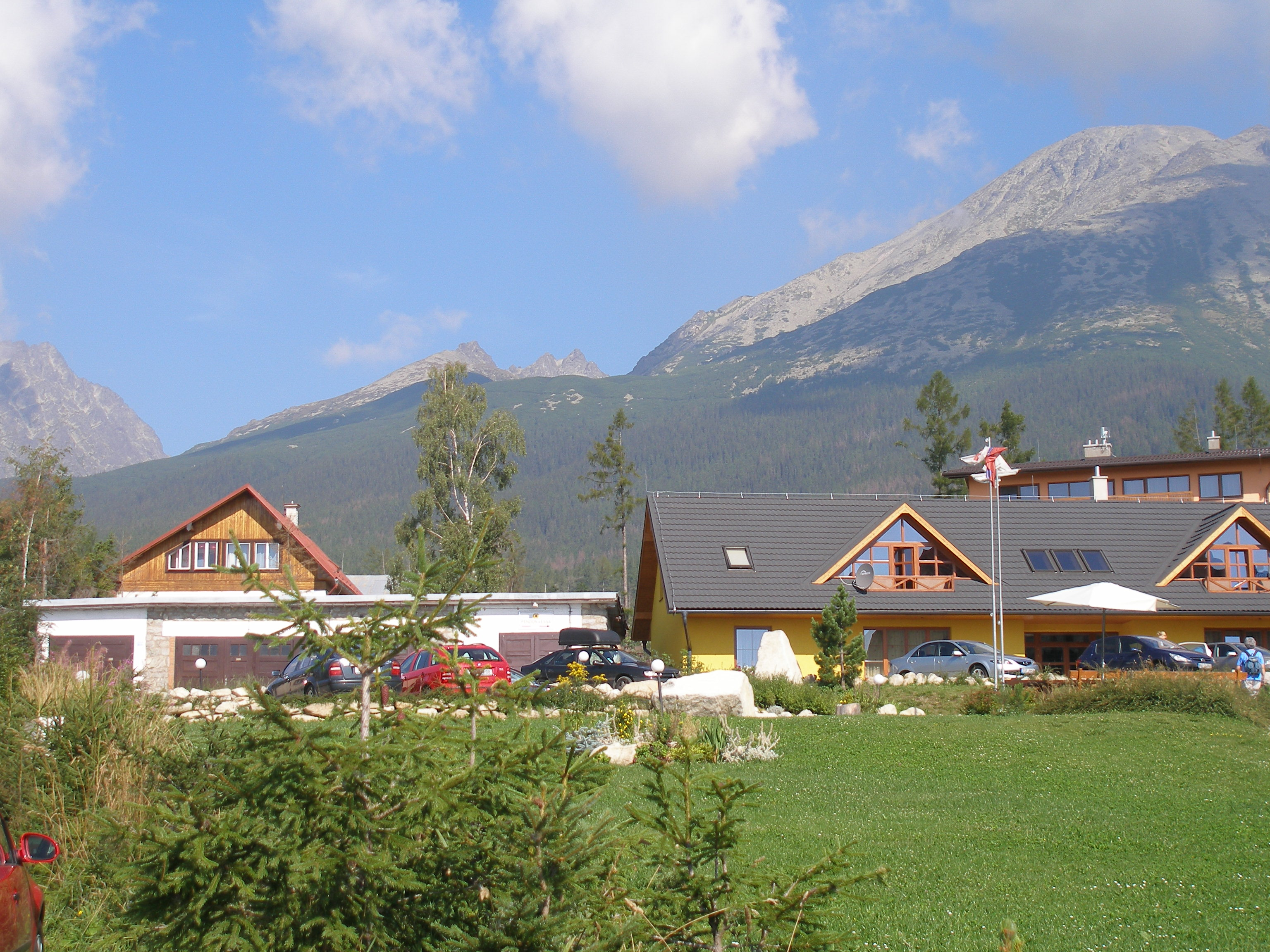 Tatranská osada Nový Smokovec, mesto Vysoké Tatry, región Spiš